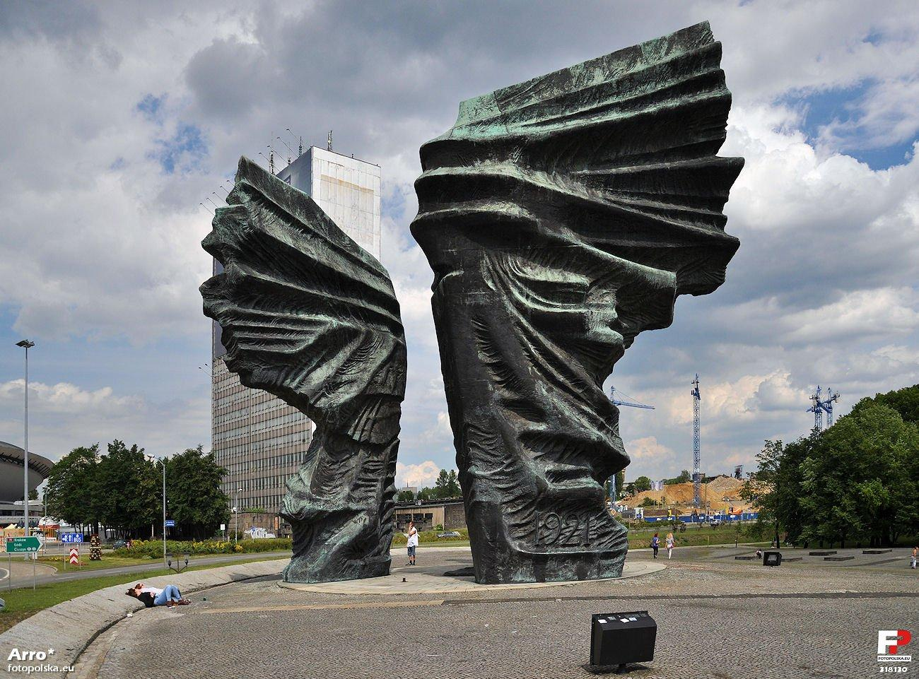 Pomnik Powstańców Śląskich w Katowicach